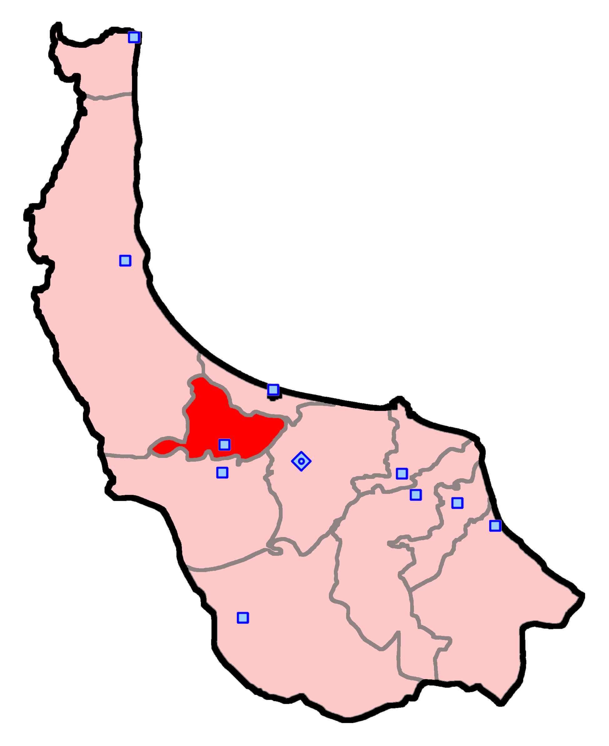 صومعه‌سرا برای انتخابات مجلس شورای اسلامی